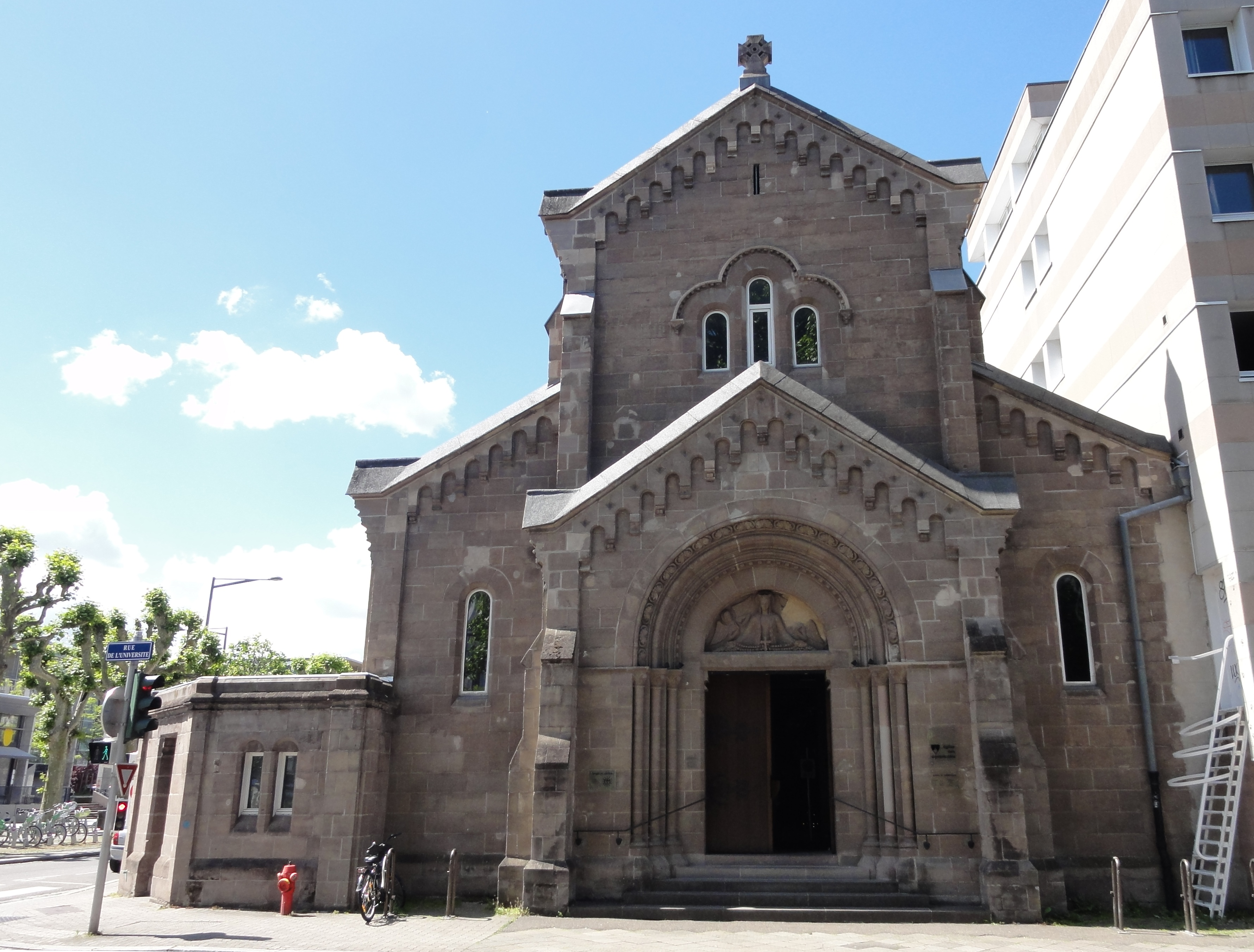 Alsace, Bas-Rhin, Église des Dominicains (1931) de Strasbourg, 41 boulevard de la Victoire.